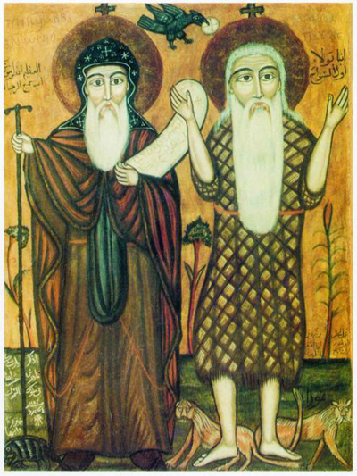 Coptic icon of St. Anthony the Great and Paul of Thebes. Свв Антоний Великий и Павел Фивейский. Коптская икона